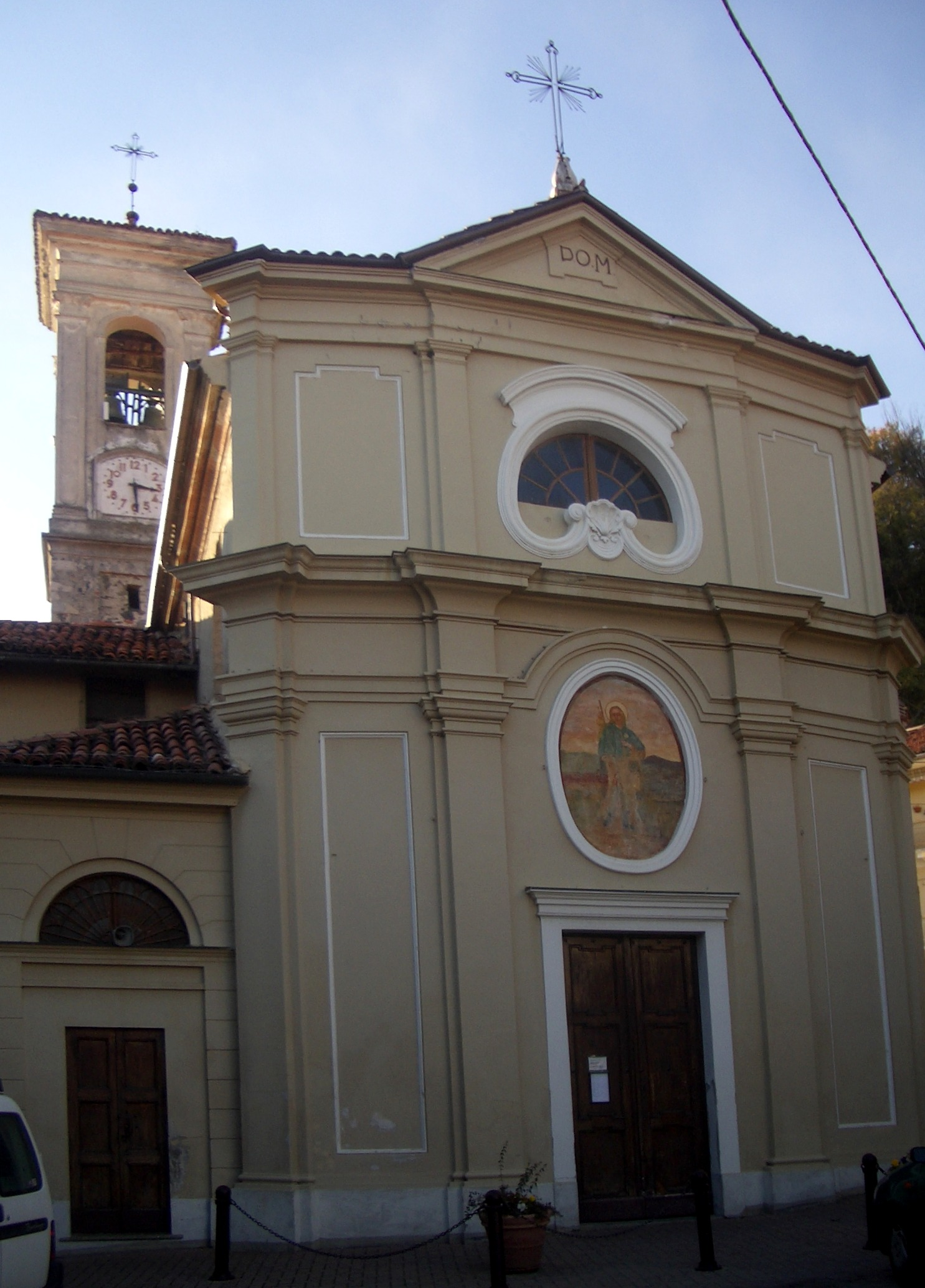 Chiesa di San Rocco, Samone, Turin, Italy